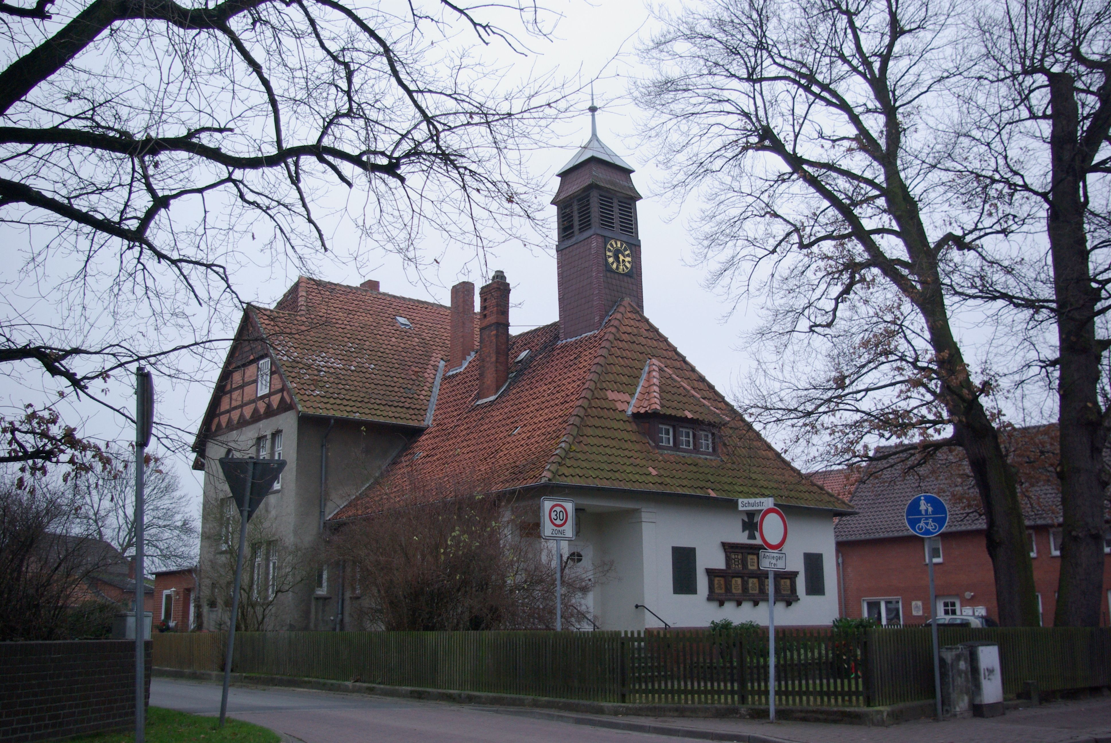 Sarstedt, Ingeln-Oesselse, Ortsteil Ingeln, die alte Schule Baujahr 1911, bis 1973 Schule, seitdem Veranstaltungsraum, im Inneren Gedenktafeln der Gefallenen der Weltkriege (geotags in den Exif-Daten).